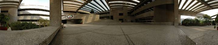 Explanda de El Colegio de México